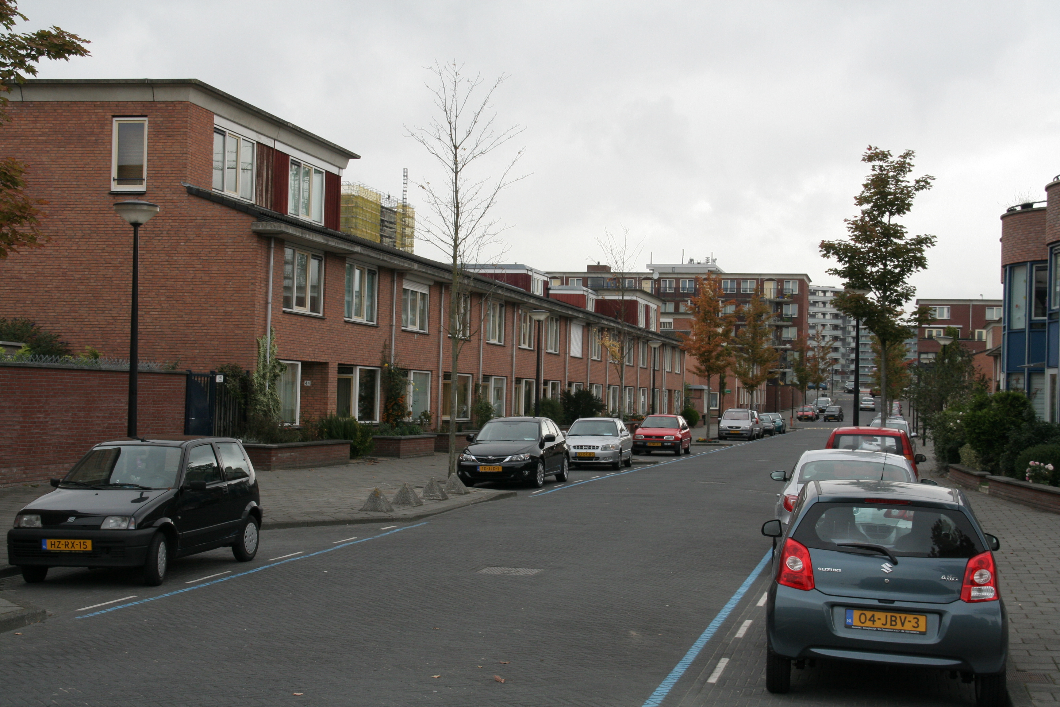 Pikoletstraat, Amsterdam Zuidoost Bijlmer. Grote delen van de oorspronkelijke Bijlmermeerflats zijn in de jaren '90 en '00 vervangen door woningen.